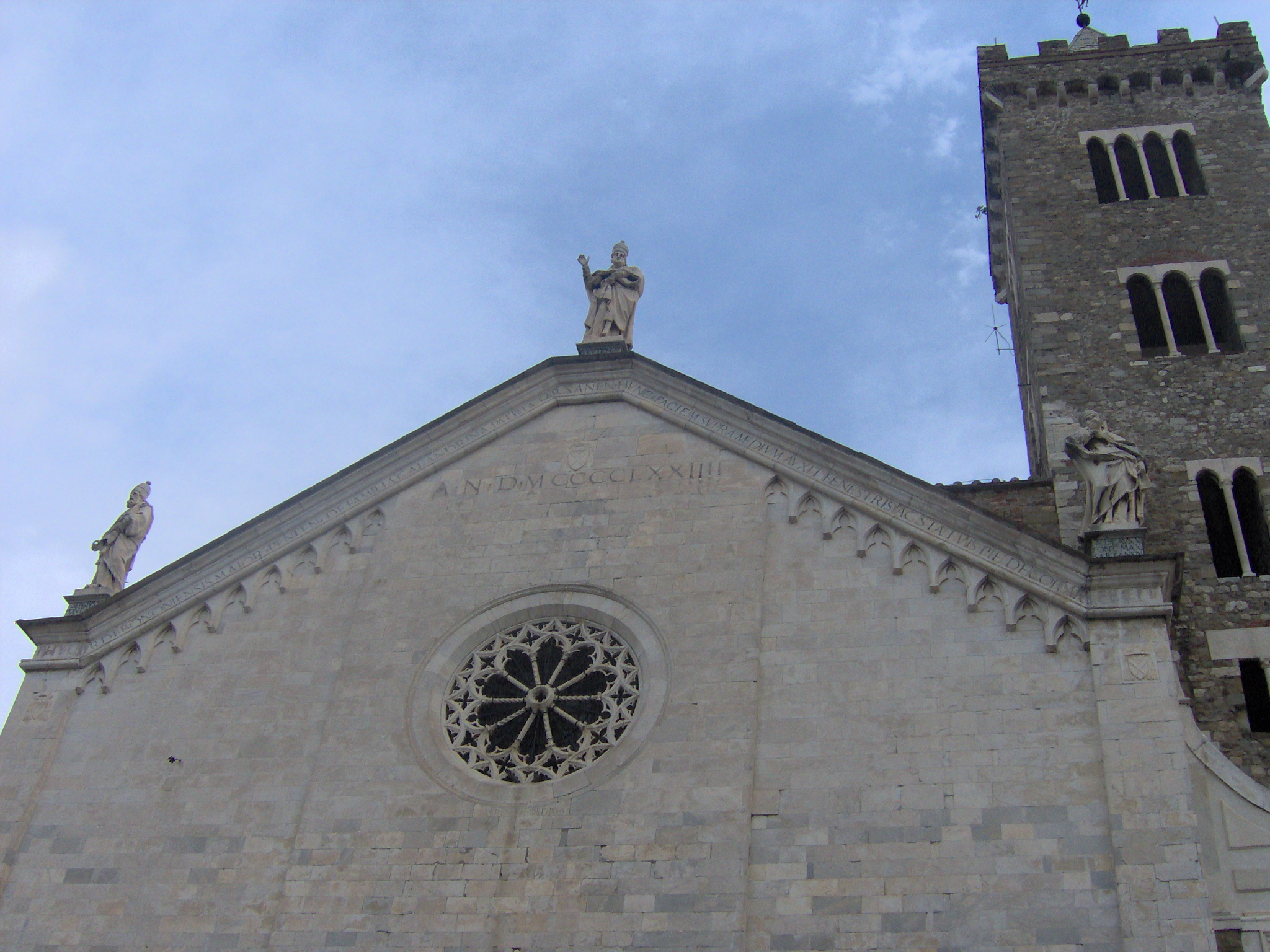 foto provincia spezia